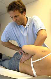 manuellterapi1